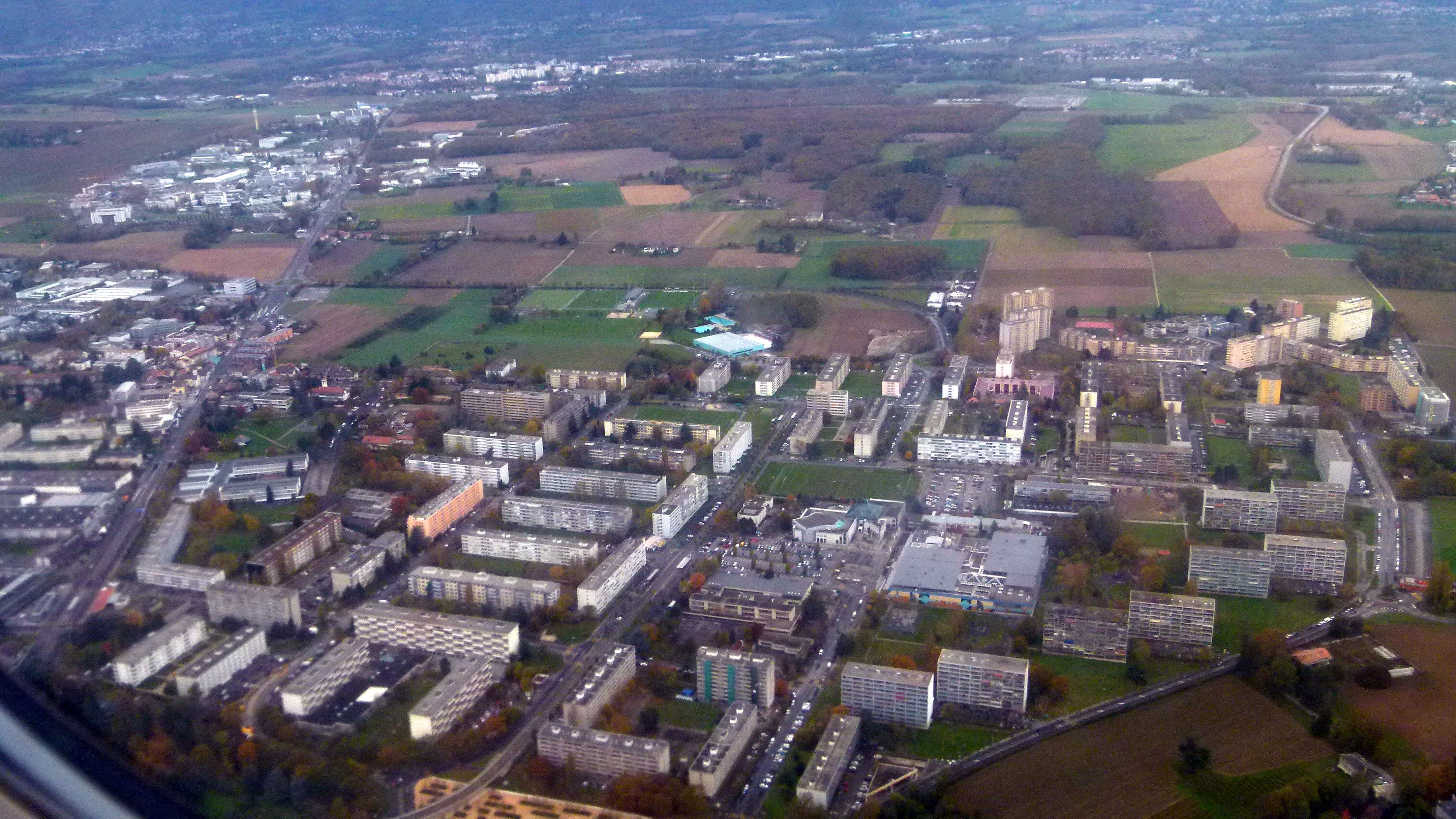 Luftbild von Meyrin, inkl. CERN oben links